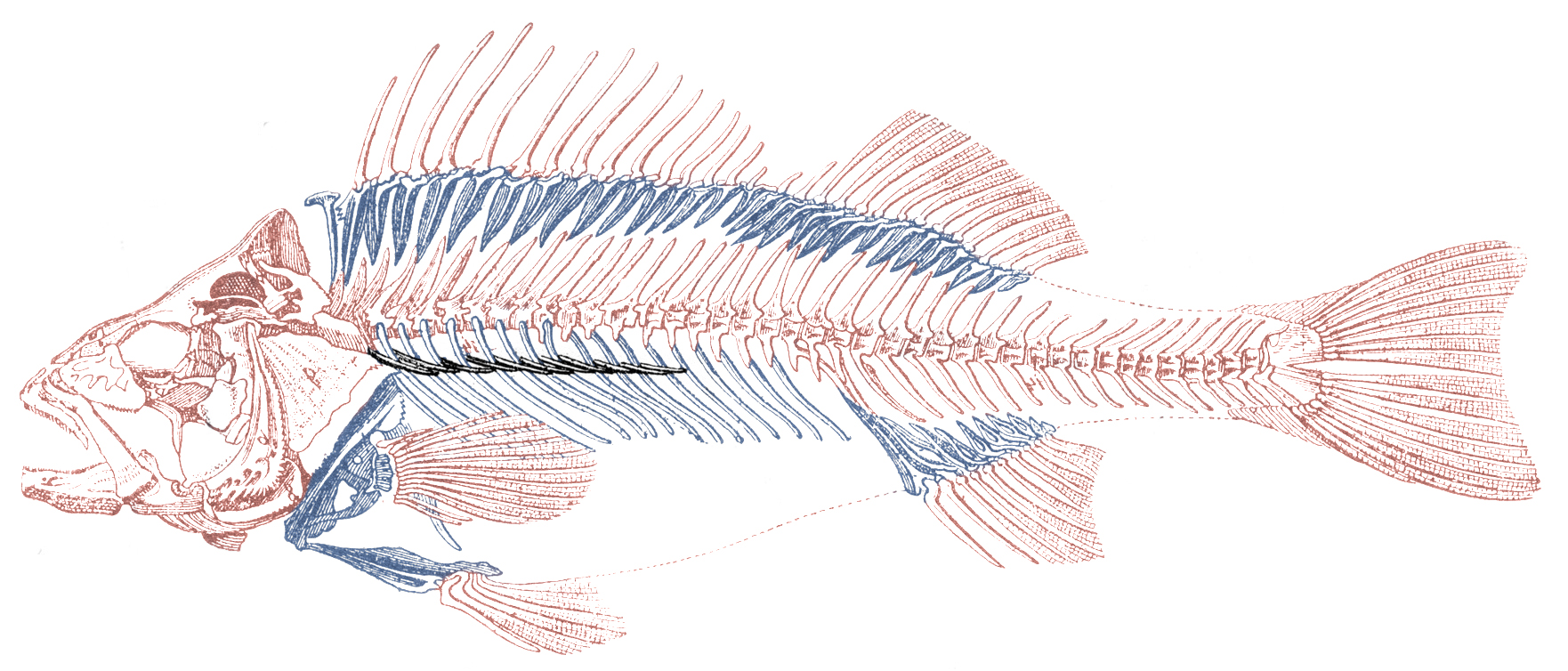 Skelett eines Barsches mit farblich hervorgehobenen Gräten (schwarz: eigentliche Gräten, blau: Rippen und Flossenstrahlträger)